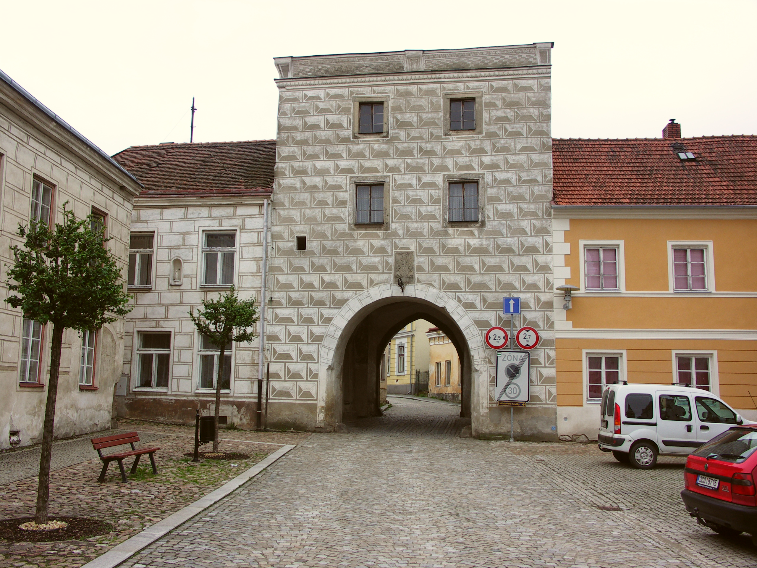 Městské opevnění (Slavonice), Slavonice